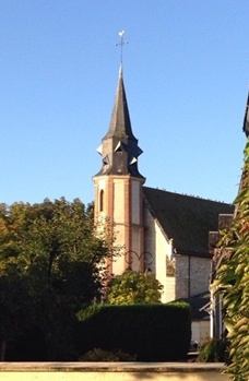 Clocher de Donnemain-Saint-Mamès